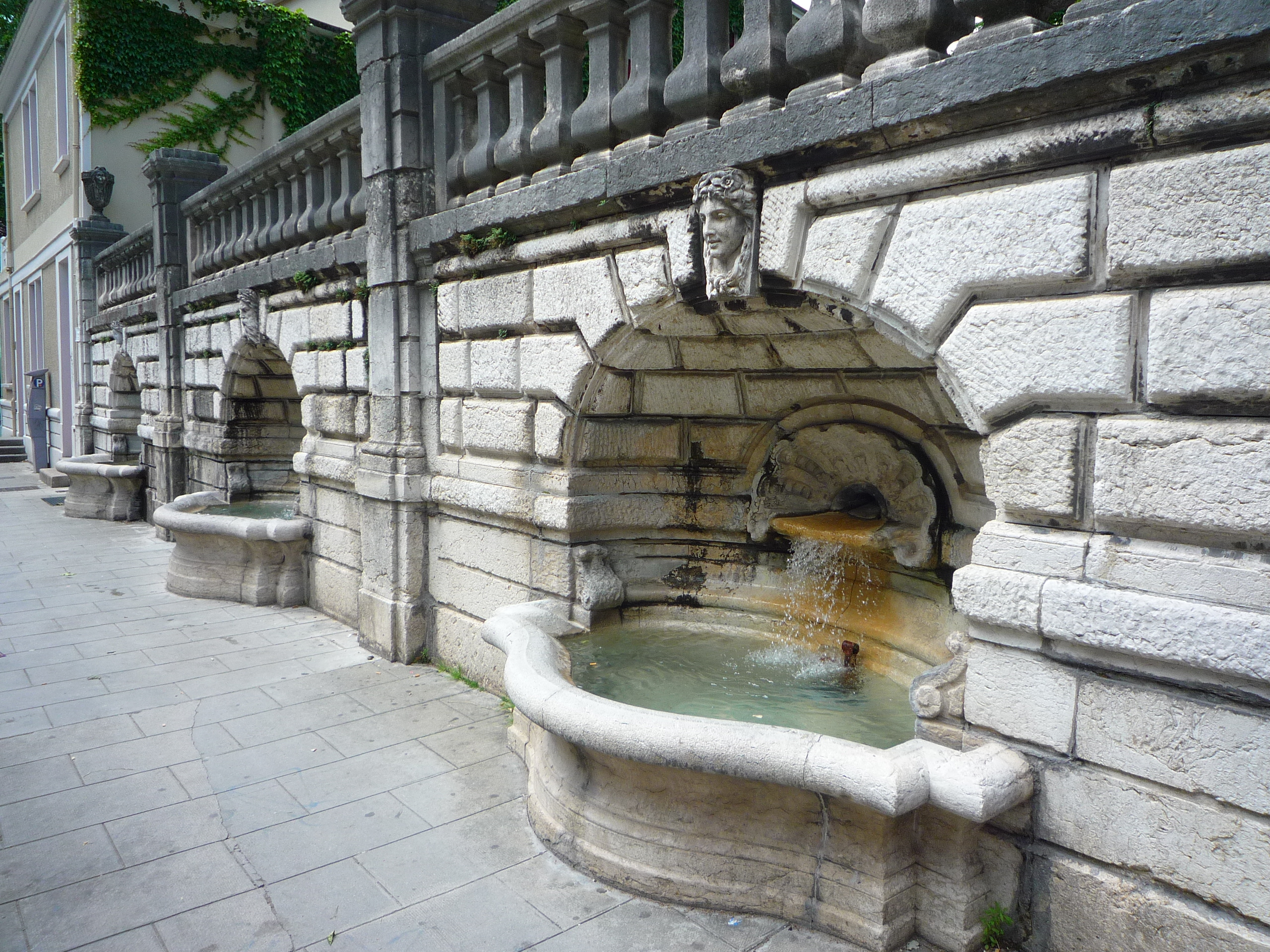 Fontaine aux caveaux (1887) remplace celle de Jean Alluys faite en 1676. Mur du jardin de ville de Grenoble.